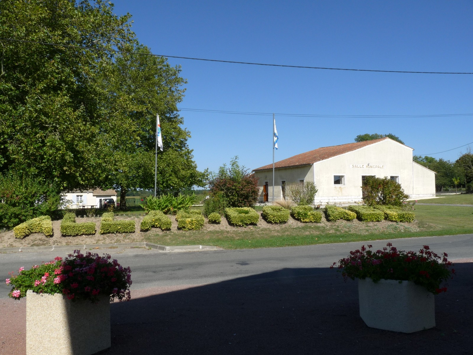 Salle des fêtes d'Allas-Bocage, Charente-Maritime, France